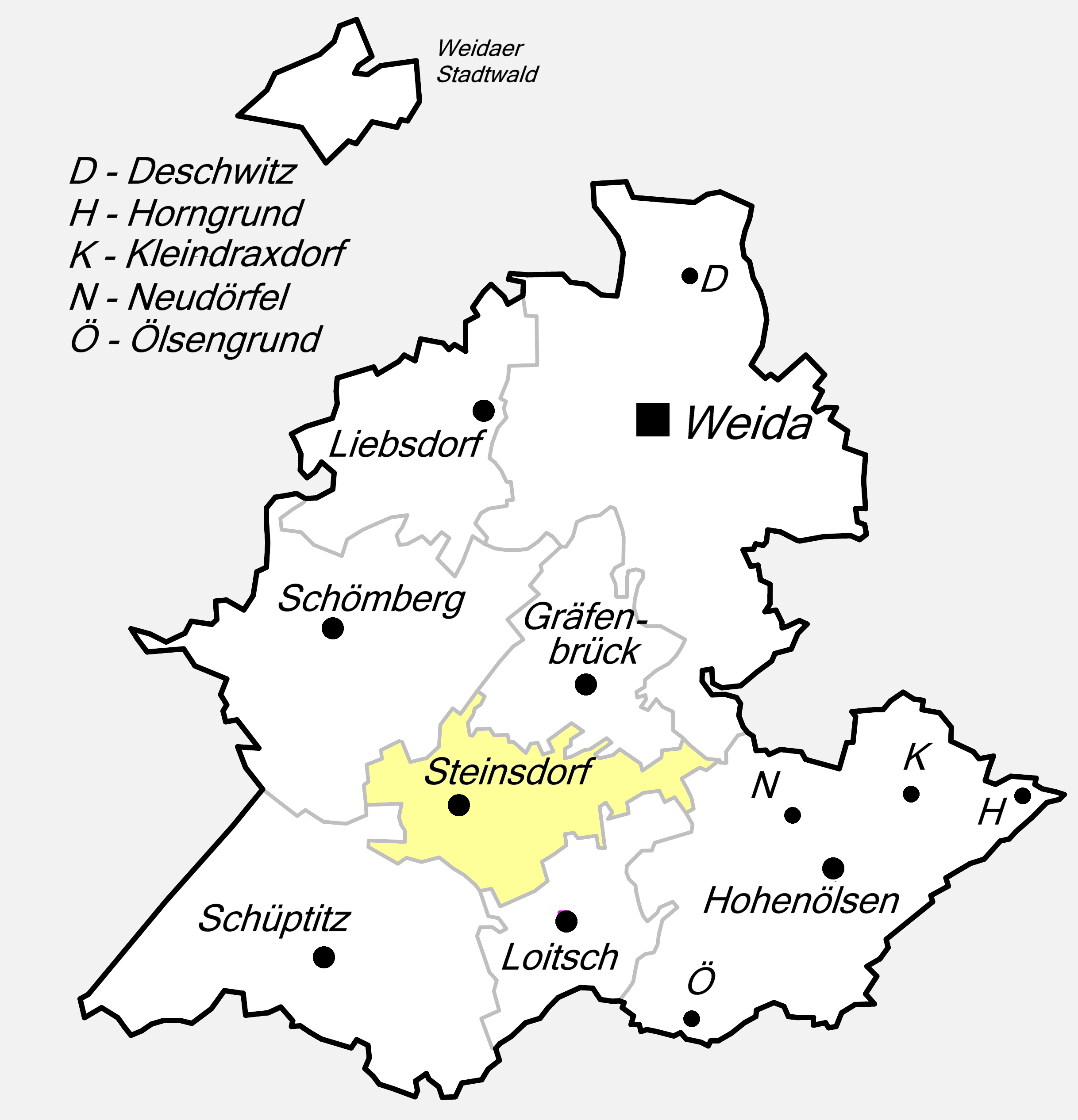 Lagekarte zum Weidaer Stadtteil Steinsdorf.